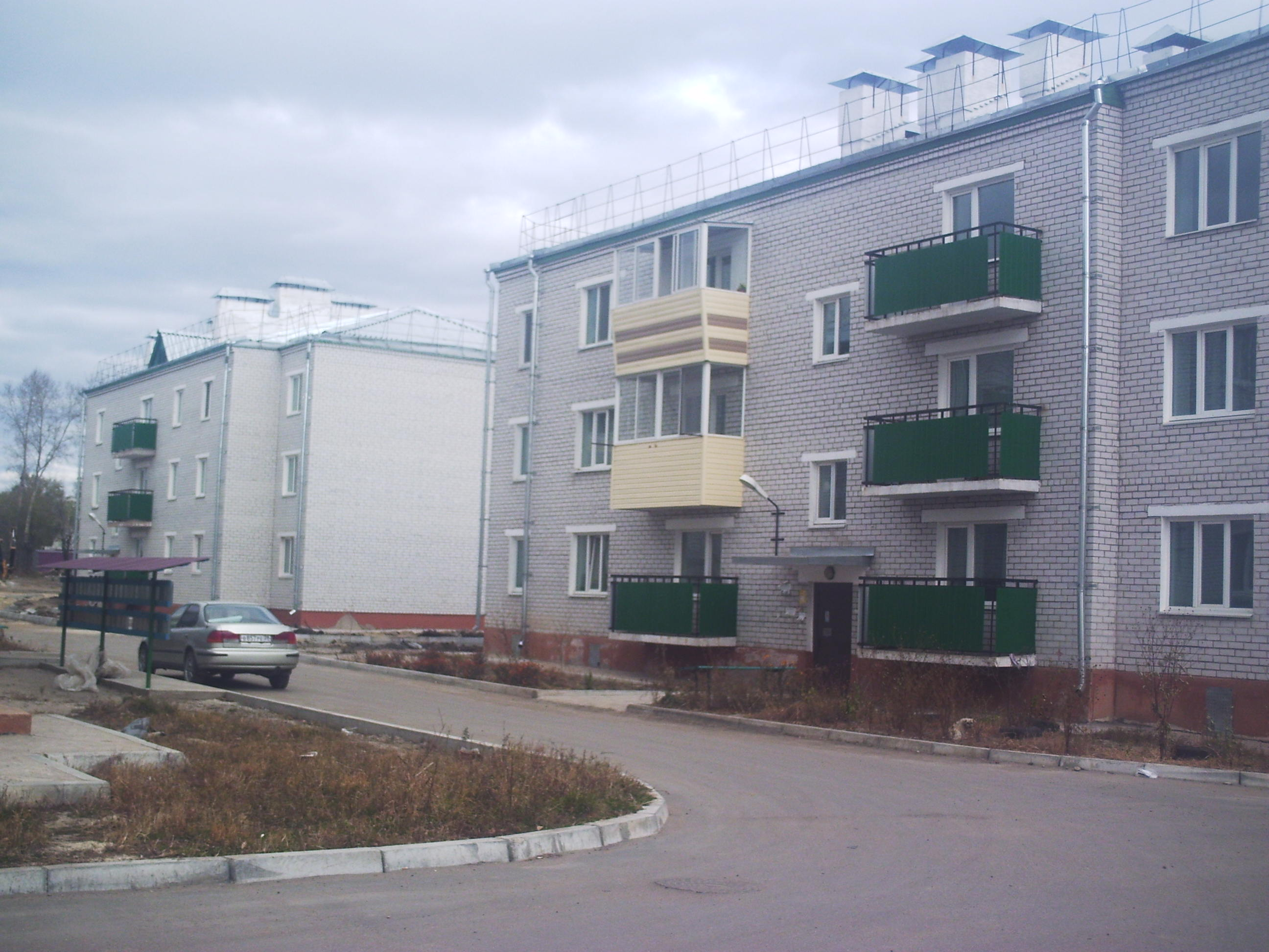 Новый дом